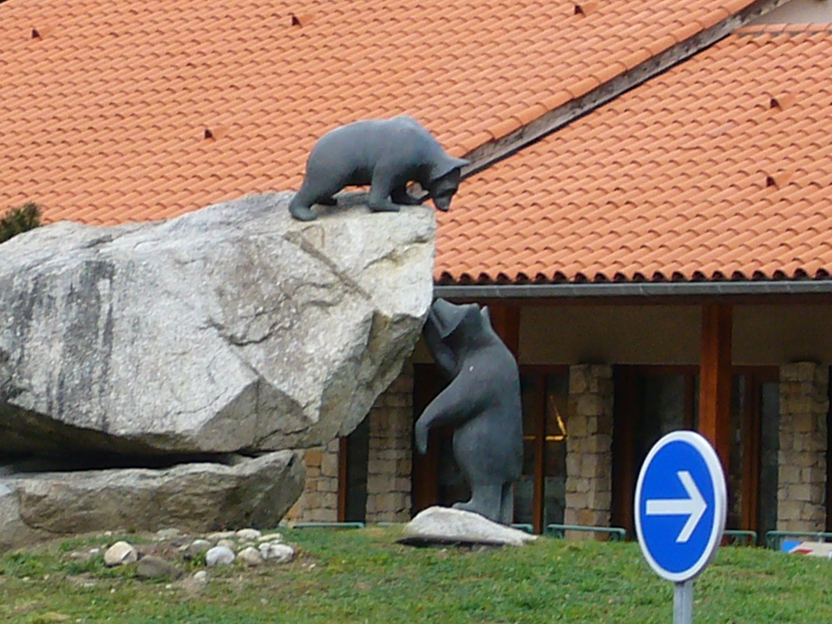 Sculptures d’ours sur un rond-point à Axat dans l’Aude (France).